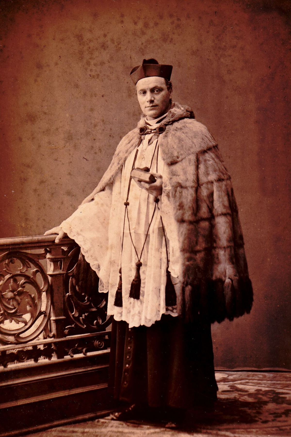 Geistlicher mit einer Almucia (Almutia), einem Umhang aus Fehrückenfellen mit Fehschweifen; Fribourg, Suisse; um 1900.